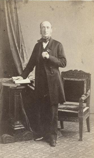 Michel Chevalier (1808-1879)